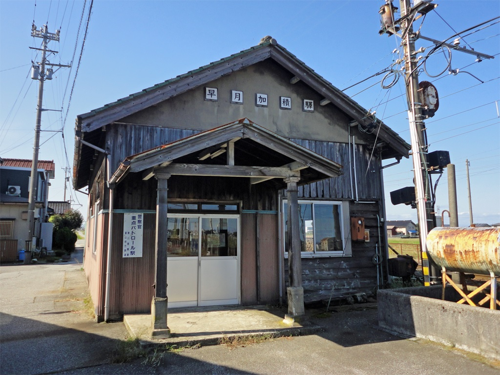 富山地方鉄道本線早月加積駅駅舎